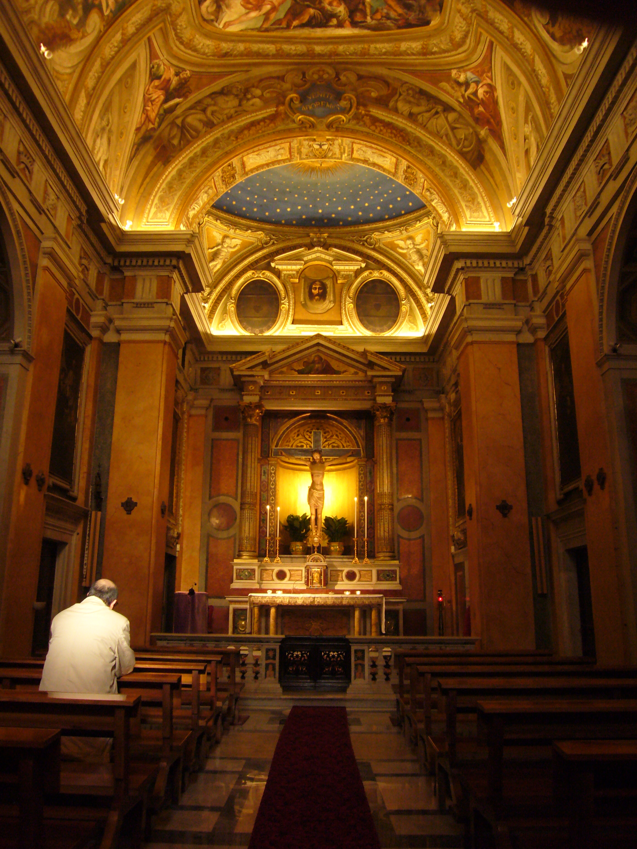 Roma, santa Birgitta a piazza Farnese, interno